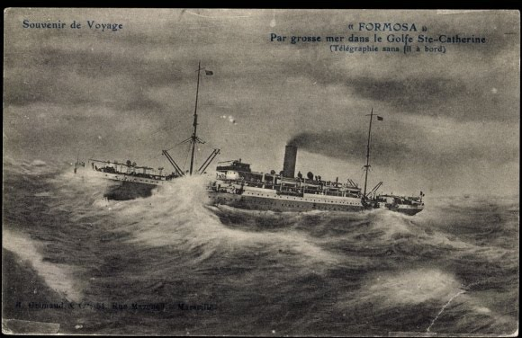 Vapor "Formosa" en el puerto de Genova